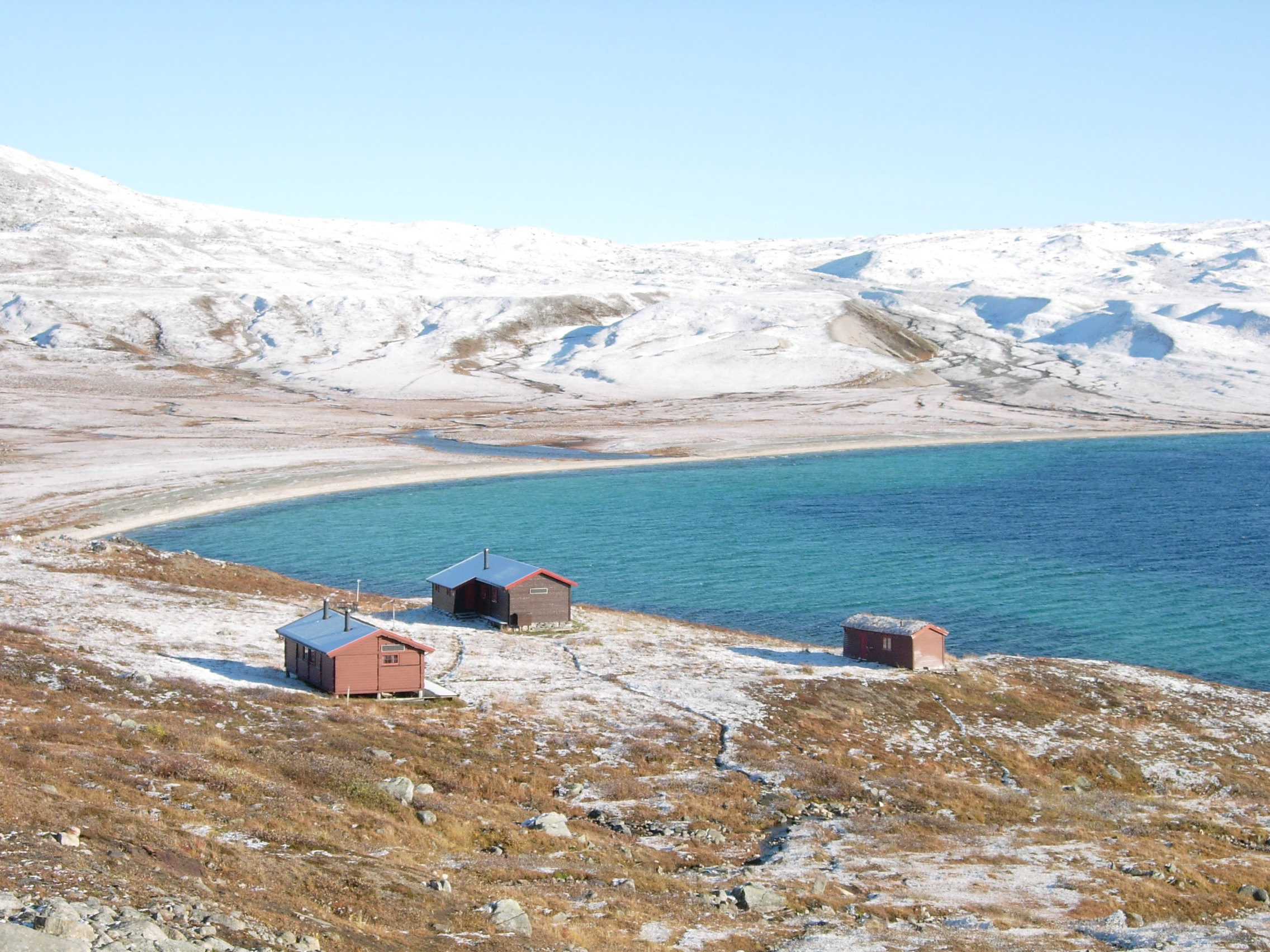 Bodø og Omegns Turistforenings hytte Bjellåvasstua, 720 m.o.h.